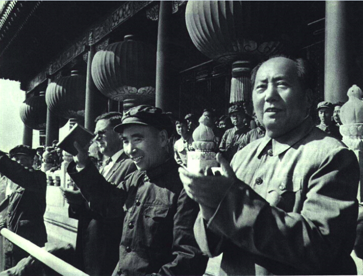 1966-11 1966年国庆典礼毛泽东林彪